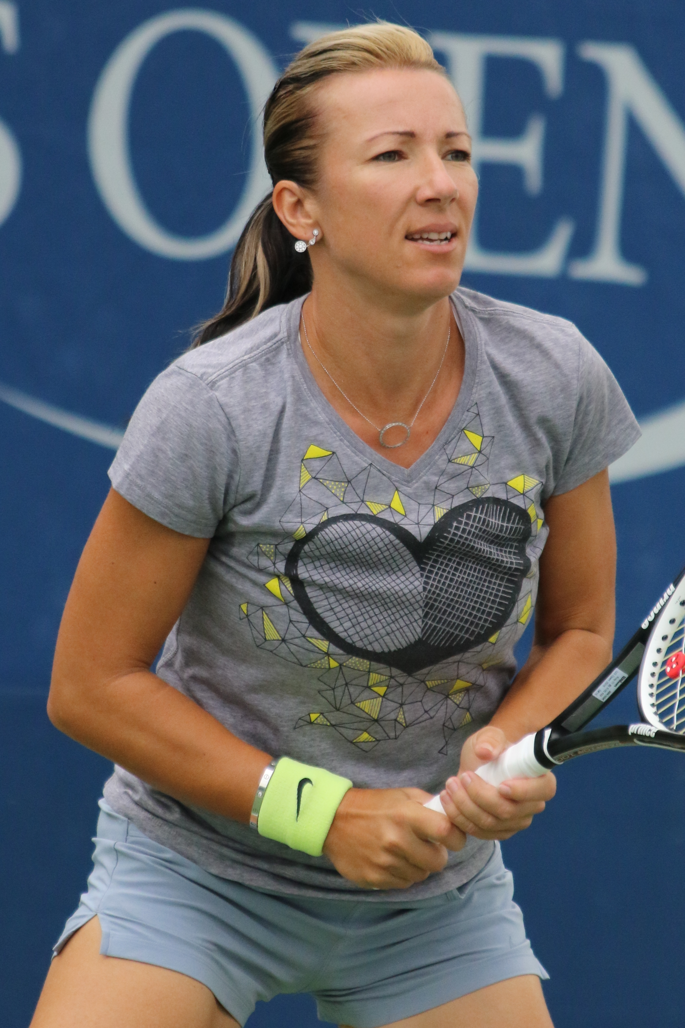 Peschke US16 (4)